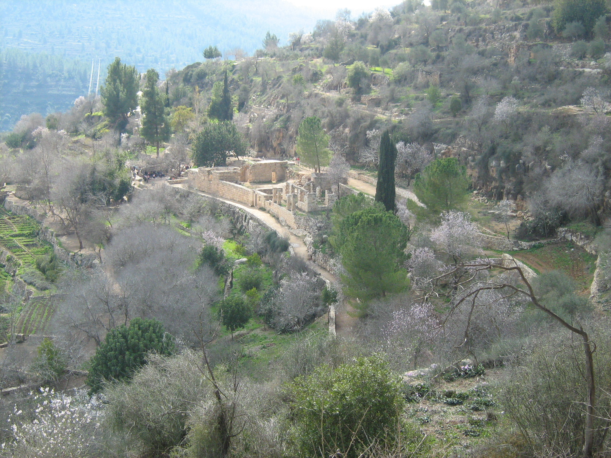 הסטף